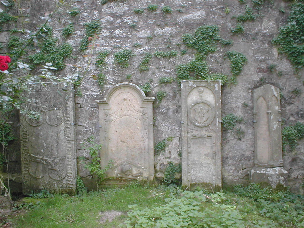 Historische Grabmale am Schloss in Fürfeld (Bad Rappenau). Von links nach rechts: Grabmal der Anna von Helmstatt geb. von Neuenstein († 1448) und des Kindes Johannes von Helmstatt († 1450), Grabmal des Posthalters Johannes Strauß († 1789), Grabmal des Amtmanns Burckhard Widmann († 1606) und Grabmal des badischen Offiziers Heinrich Otto von Gemmingen (1771-1831) und seiner Ehefrau Elisabetha von Gemmingen (1777–1824), Tochter des Posthalters Strauß. Foto von 2006, im September 2012 waren die Grabmale nicht mehr vorhanden.